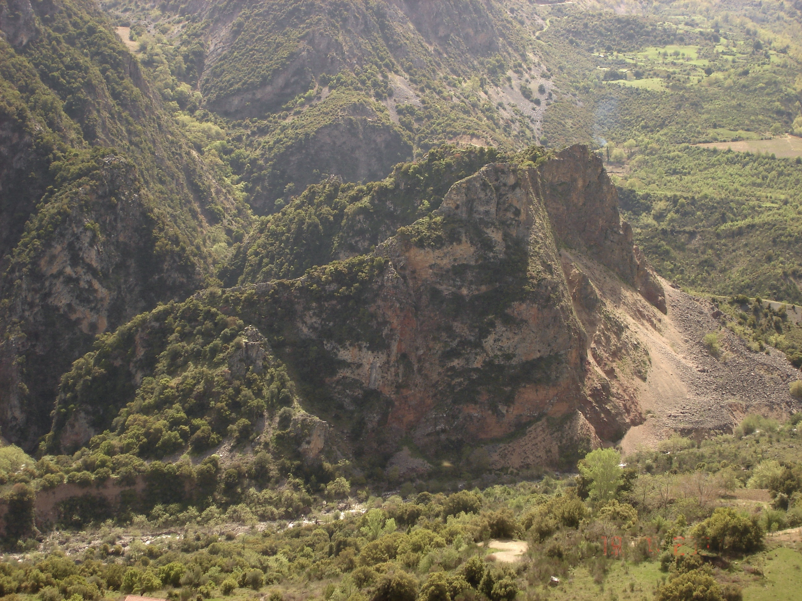 Salmeniko castle Greece Το κάστρο του Σαλμενίκου , ότι έχει απομείνει από το βουνό όπου ήταν χτισμένο.